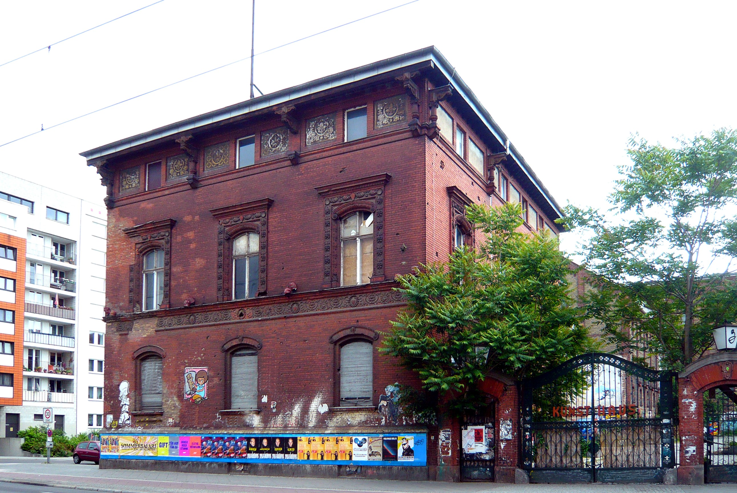 Berlin-Friedrichshain, ehemalige Brauerei Patzenhofer-Schultheiß, denkmalgeschütztes eh. Verwaltungsgebäude